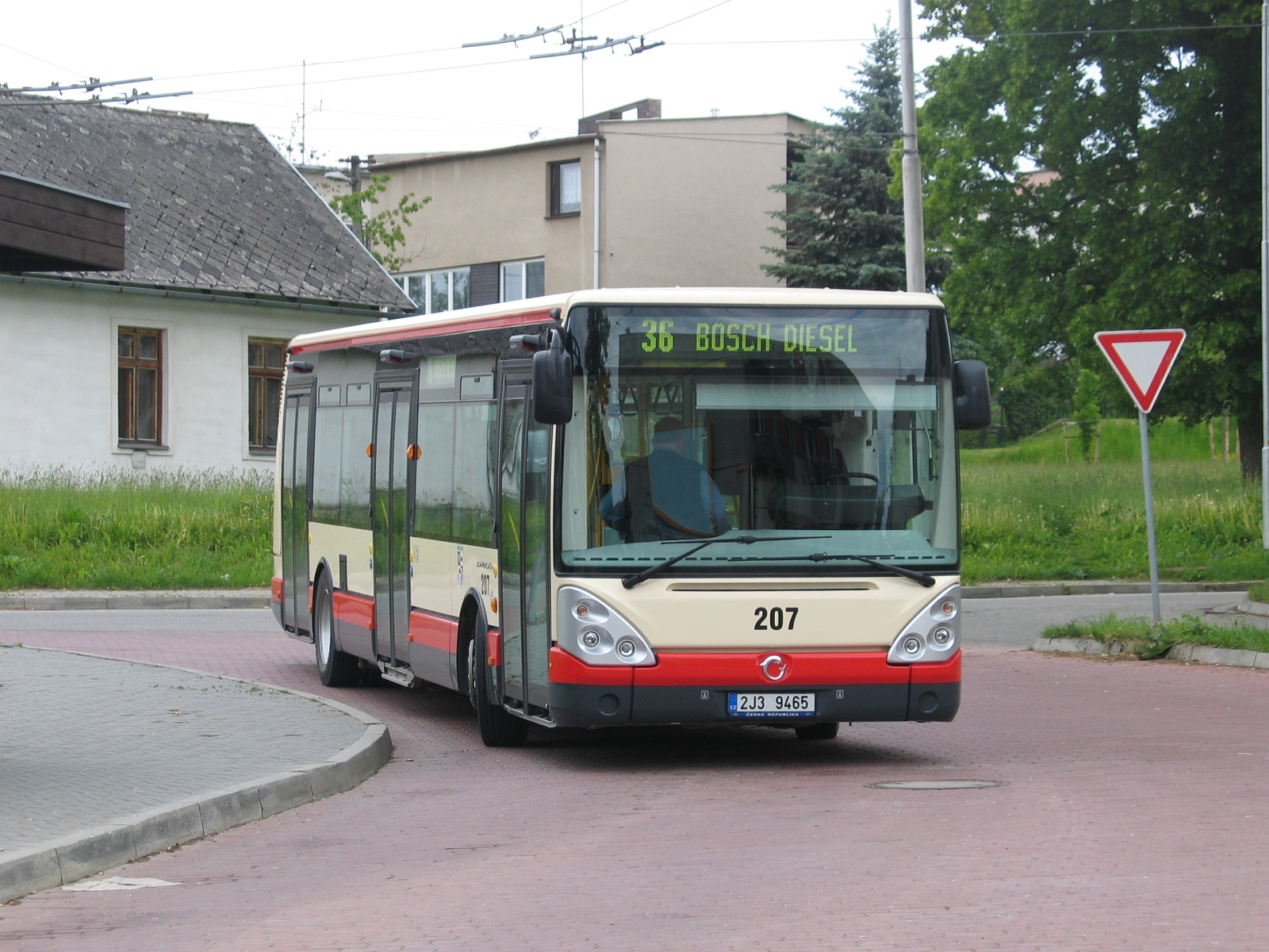 Irisbus Citelis 12 M, Jihlava